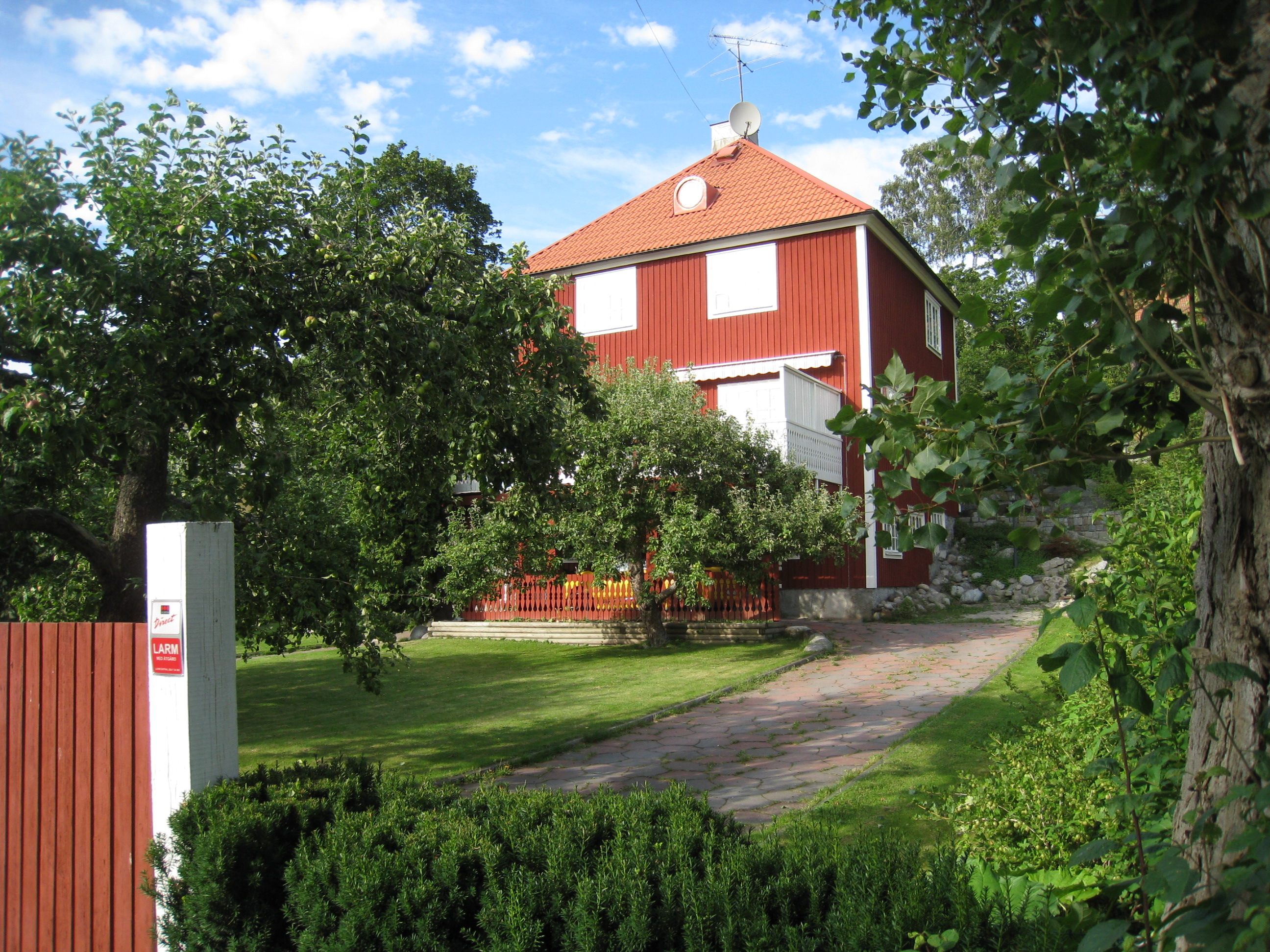 Villa i Äppelviken, Bromma, väster om Stockholm.